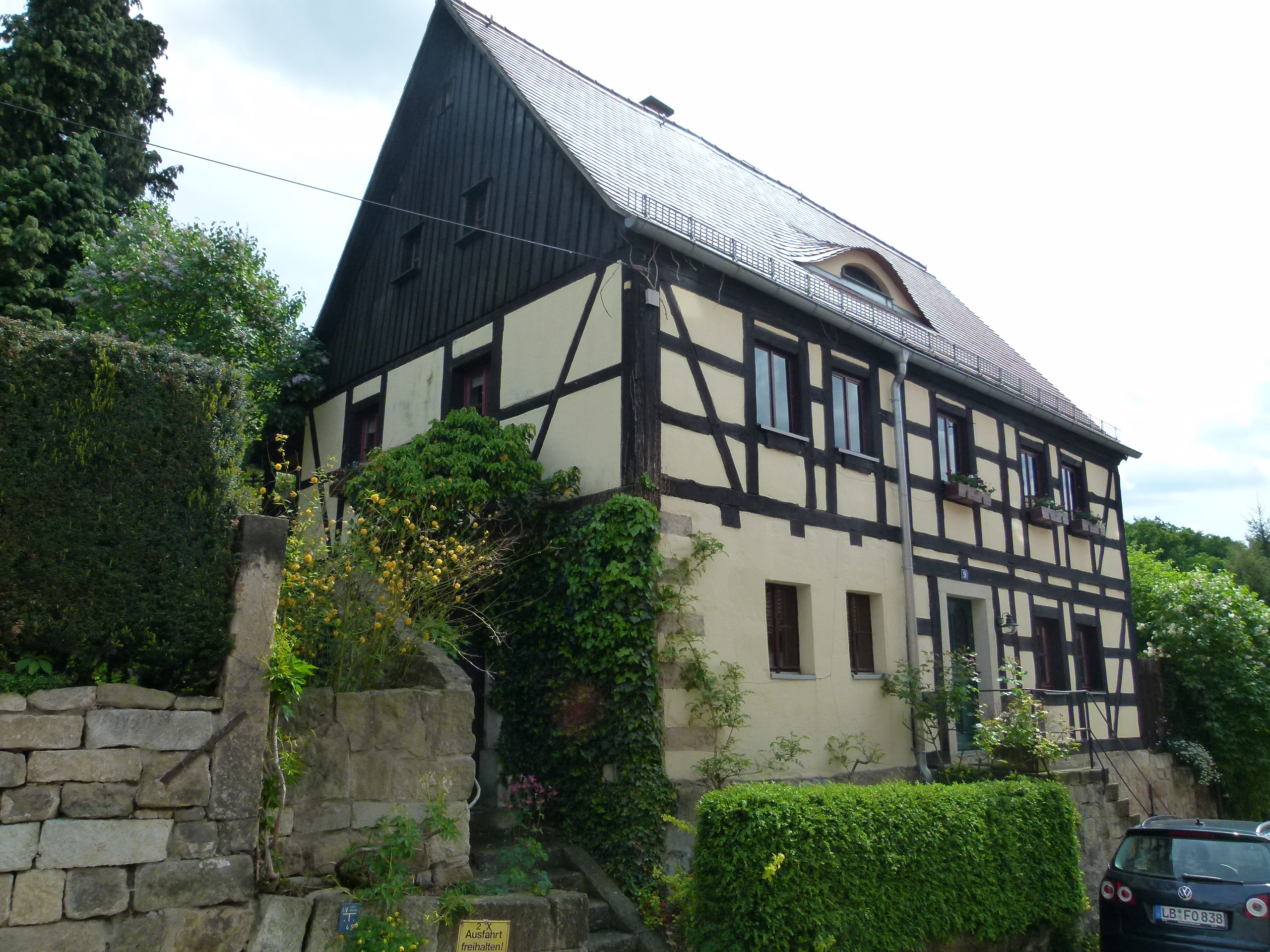 Denkmalgeschütztes Haus, Am Hausberg 9, Pirna, Sachsen